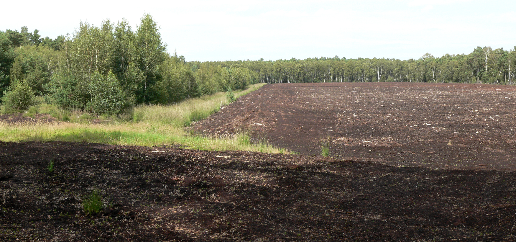 Grosses Moor Gifhorn, Torfabbaufläche